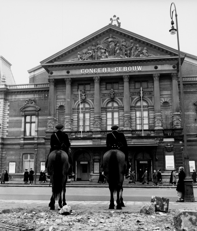 Politie te paard tegenover de ingang van het Concertgebouw, tijdens het rumoer om gastdirigent Paul van Kempen, die van 1916 tot 1946 in Duitsland actief was, 28 januari 1951 Foto Ben van Meerendonk / AHF, collectie IISG, Amsterdam